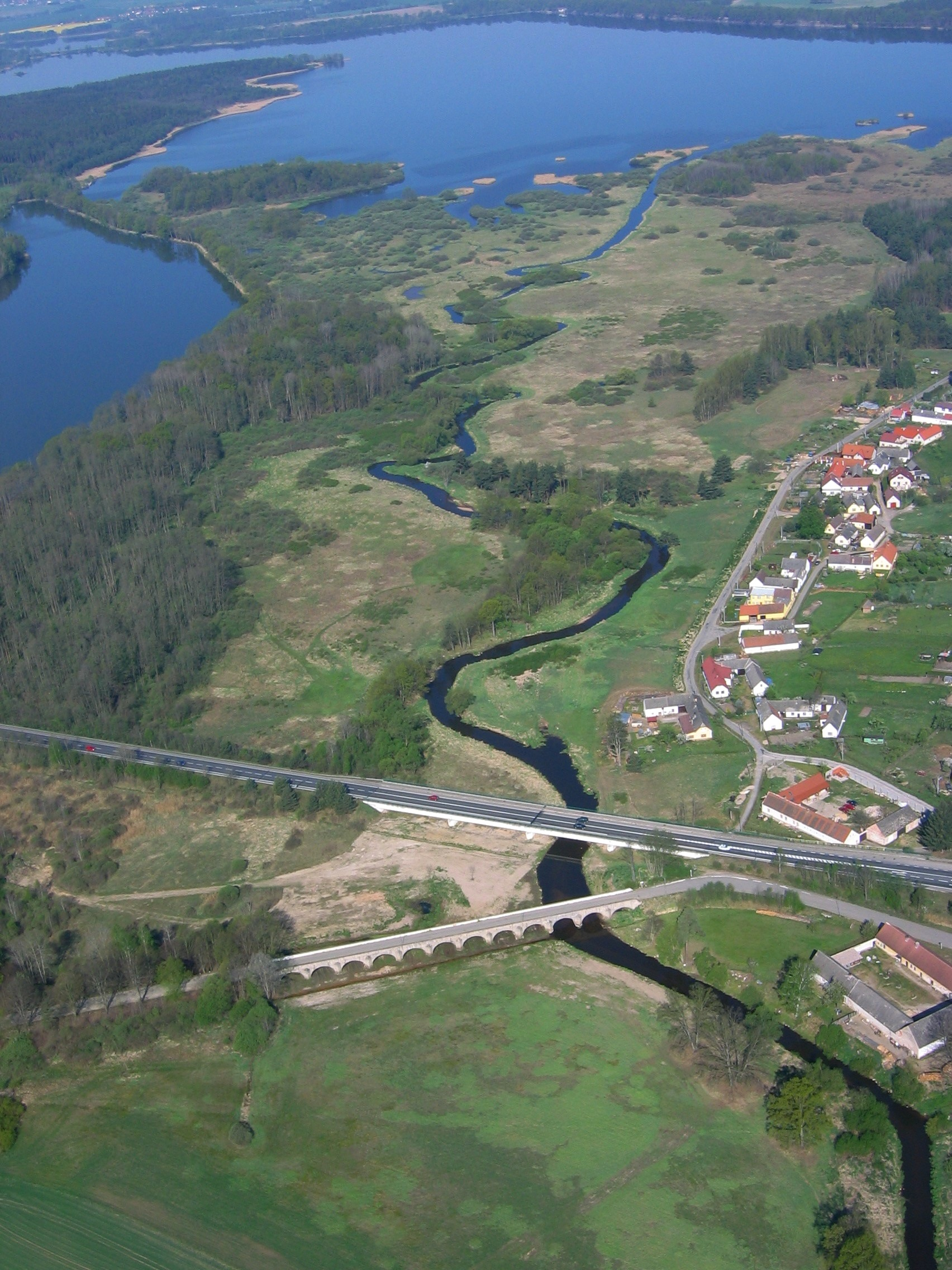 Inundační most I. (Stará Hlína), J od obce, Stará Hlína